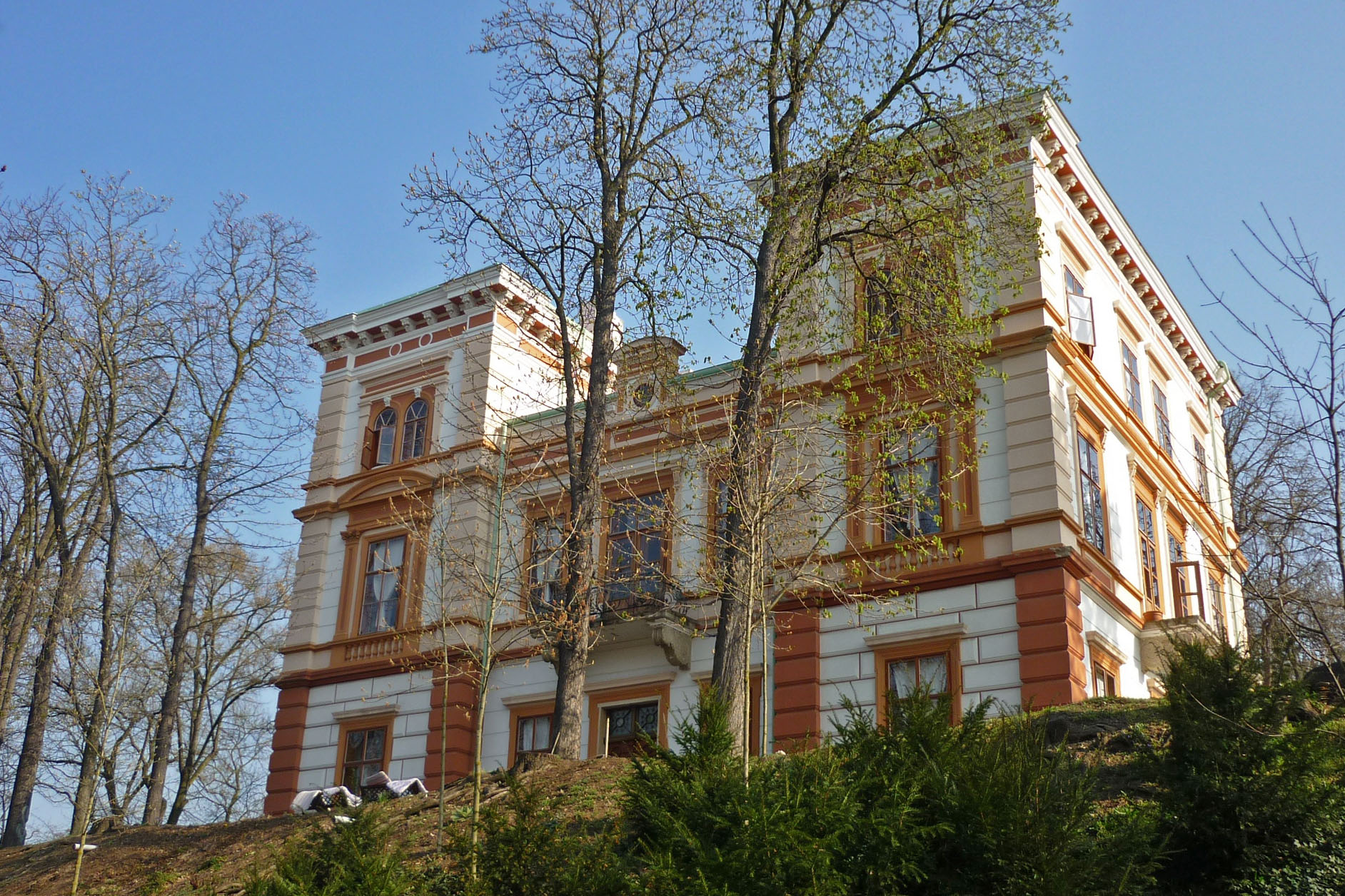 Schloss Kolosoruk (Korozluky) im Kreis Brüx (Okres Most)